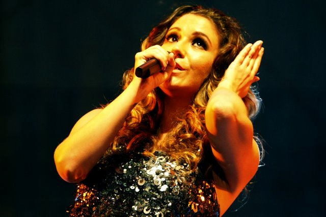 Maria Rita ao vivo em 2009.